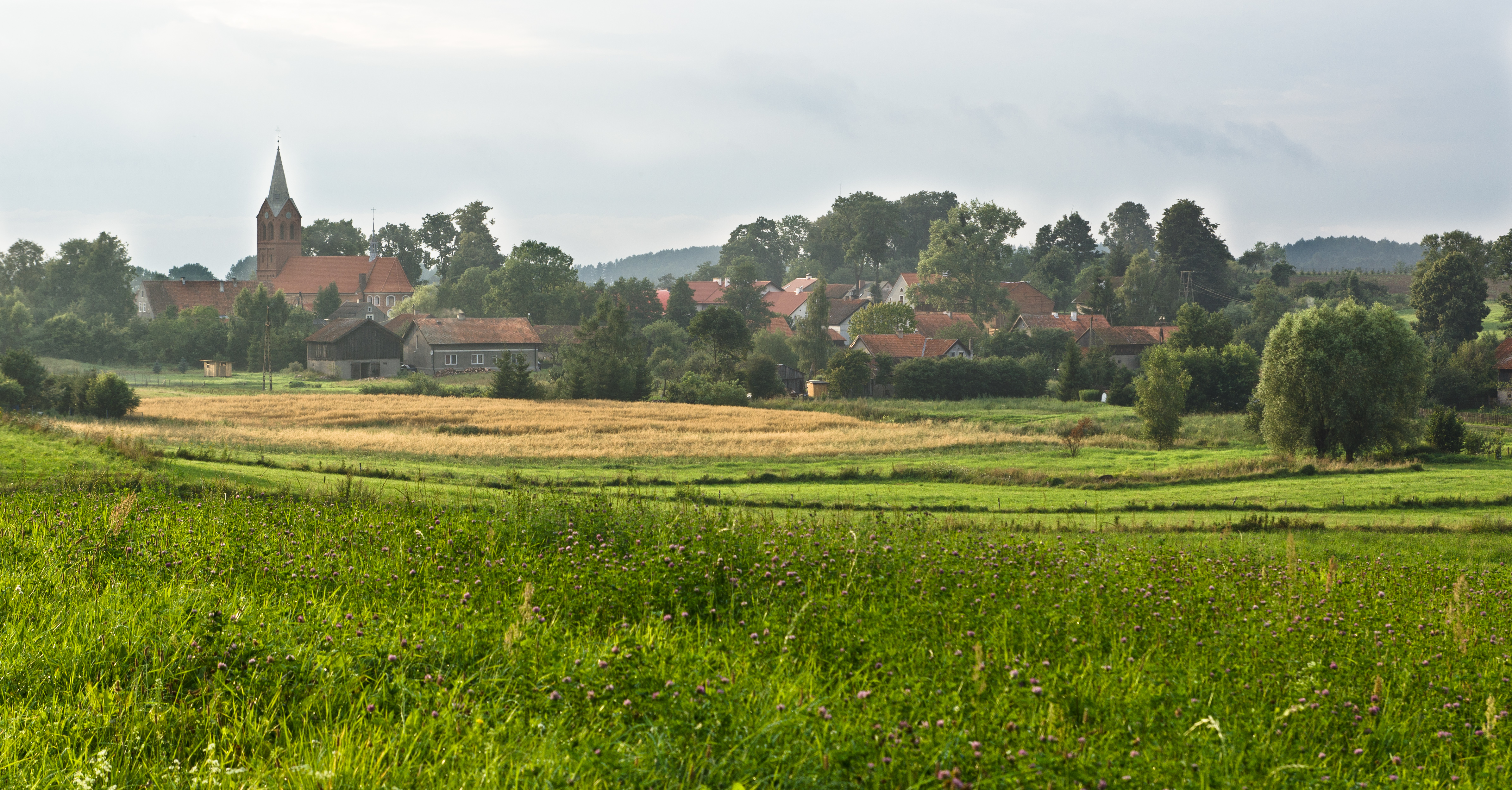 Panorama wsi Kraszewo (pow. lidzbarski), widok od strony drogi z Jarandowa.